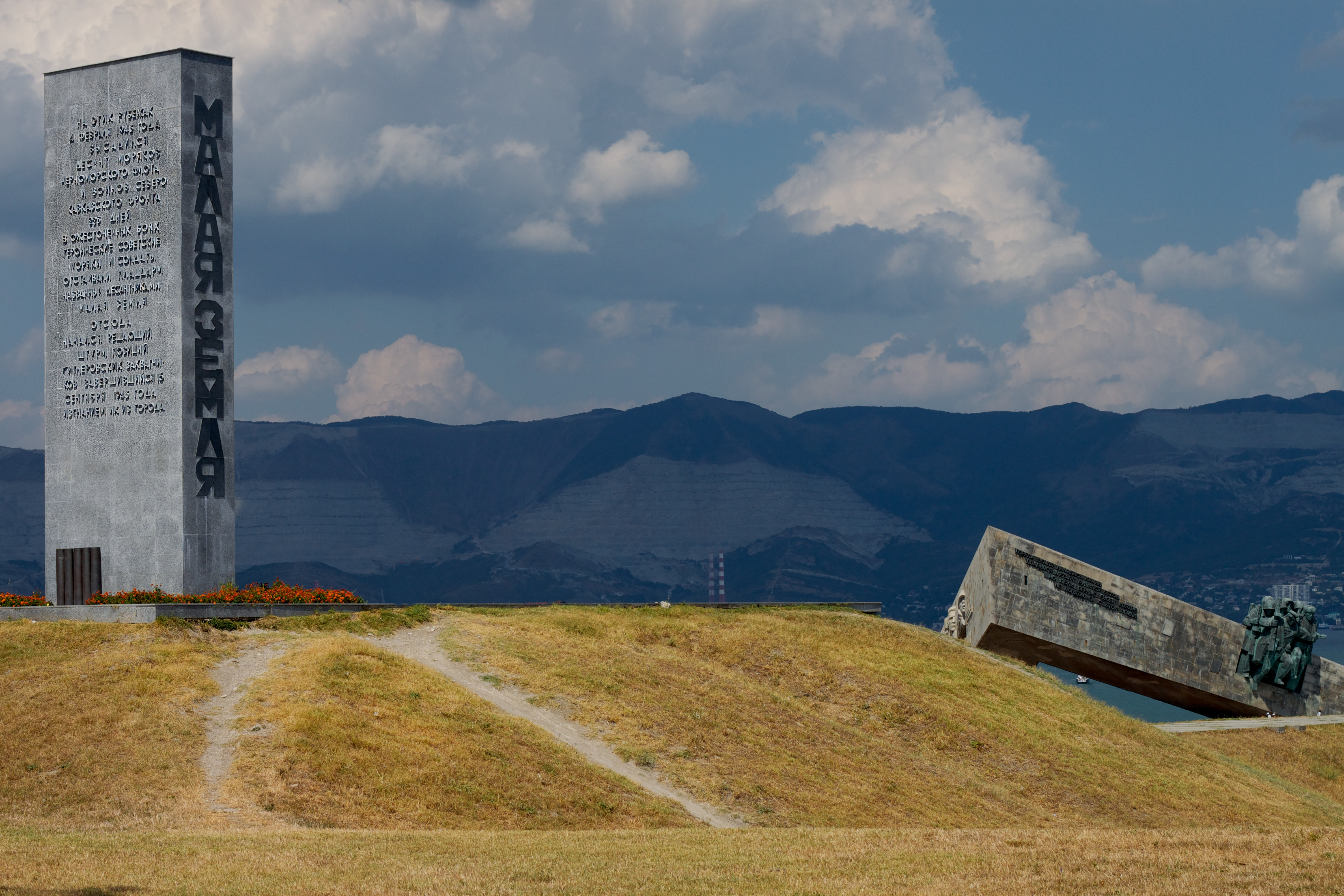 Памятное место высадки морского десанта 4 февраля 1943 г. на «Малую землю». На этом месте установлена стела. (Краснодарский край, Новороссийск, Ленина В. И. проспект, "Малая земля", Суджукская коса)